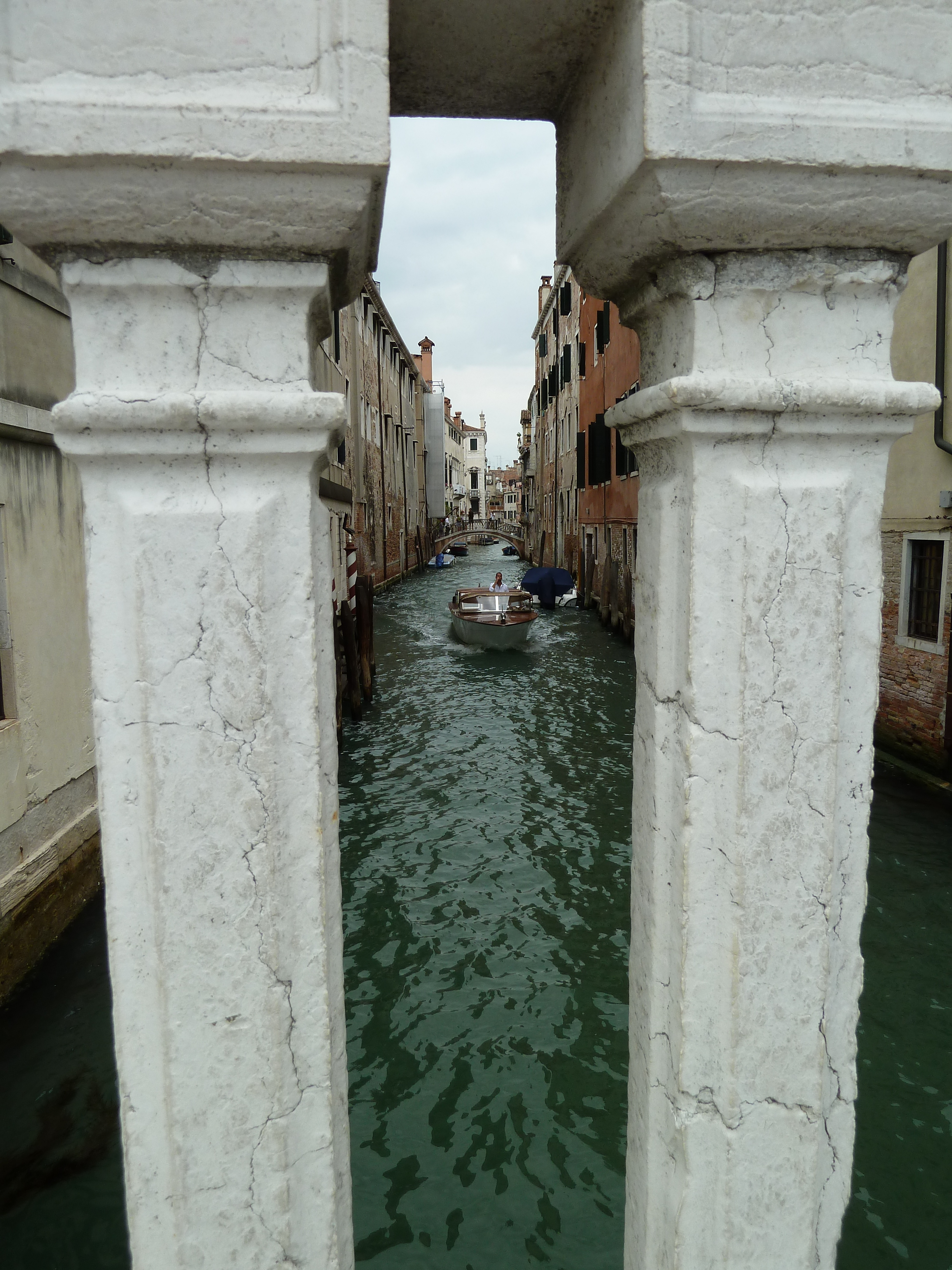 Rio della Pieta (Venice)